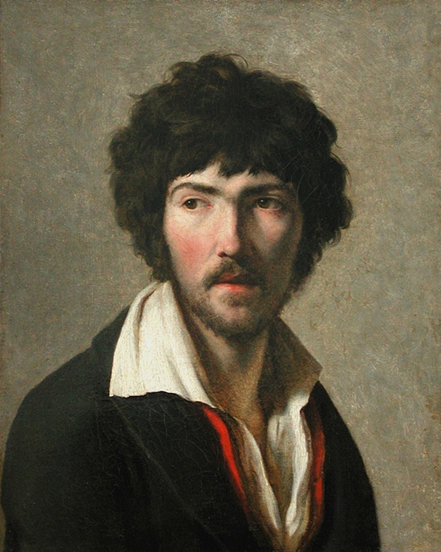 А.–Ф. Ризенер. Портрет художника Мориса Куаи (1797–1799)